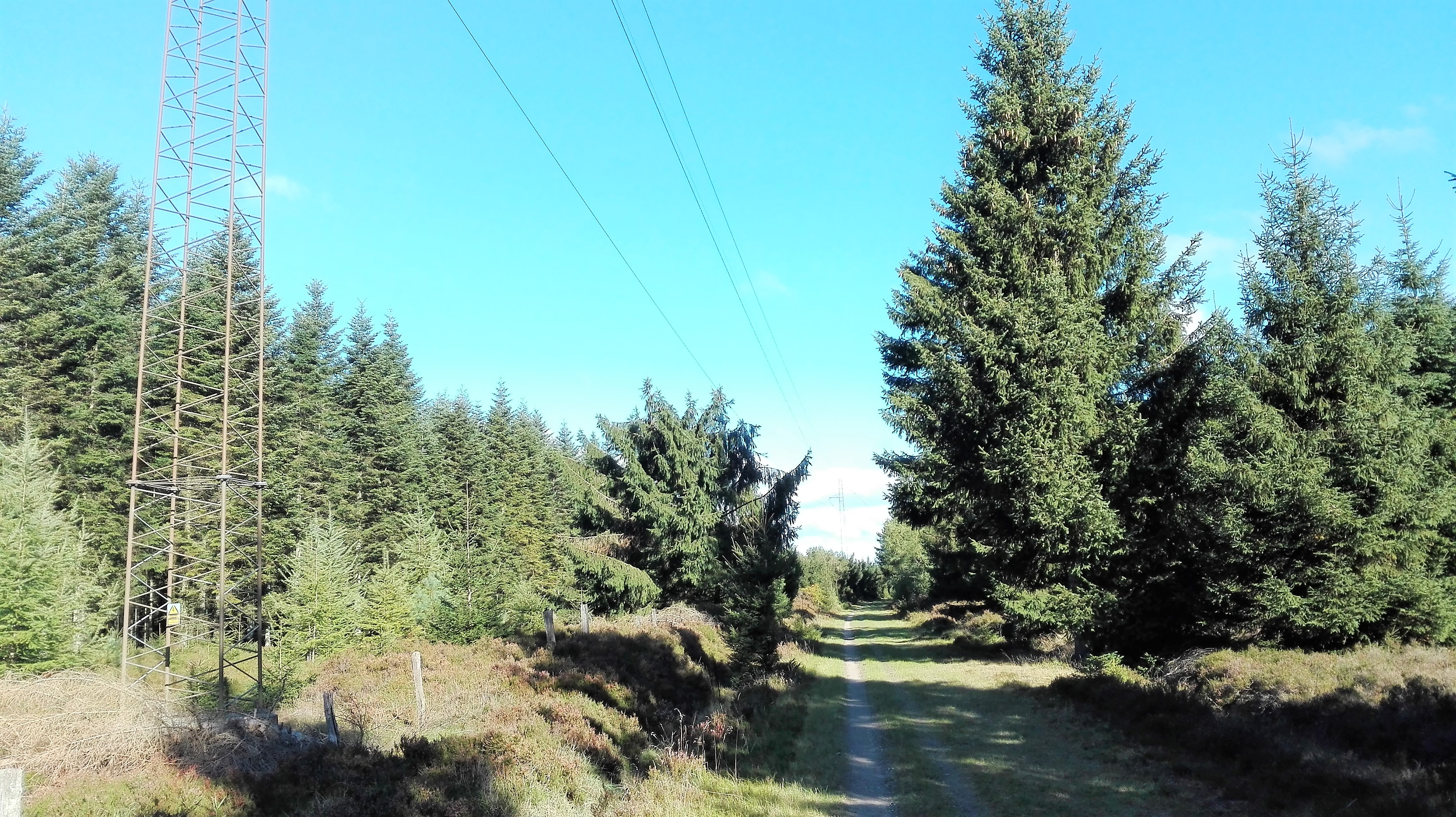 Det nedlagte jernbanespor i Gludsted Plantage nær Hjøllund